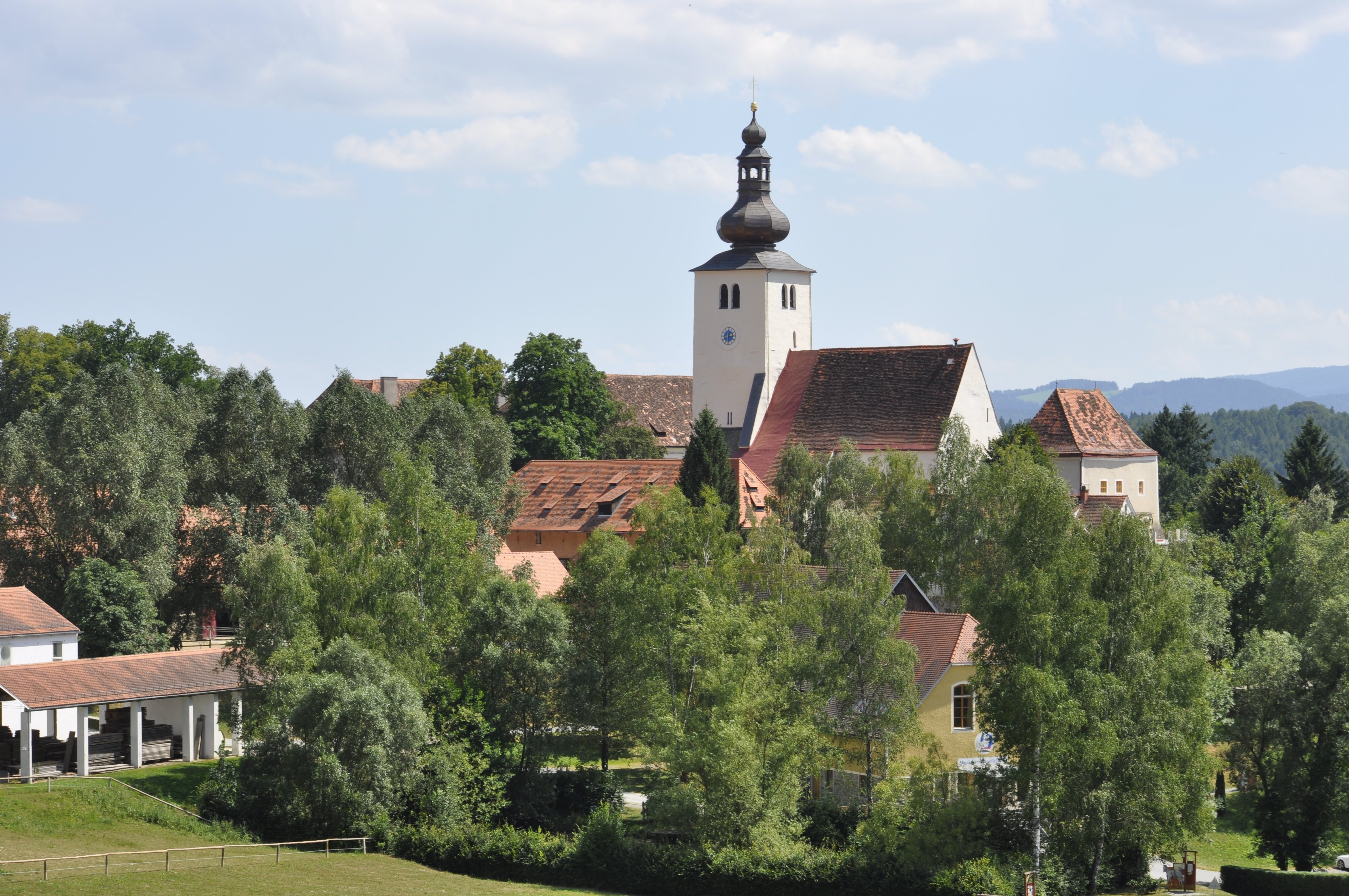 Kath. Pfarrkirche hl. Andreas und ehem. Friedhof, Piber. Gemeinde Köflach.